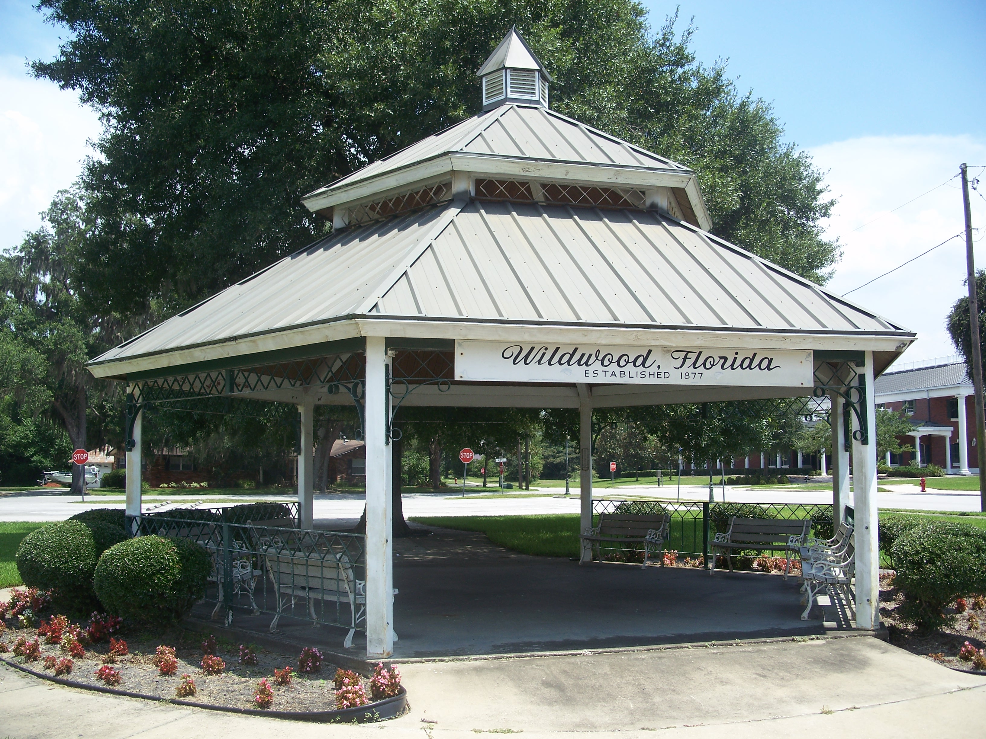 Wildwood, Florida: Gazebo.